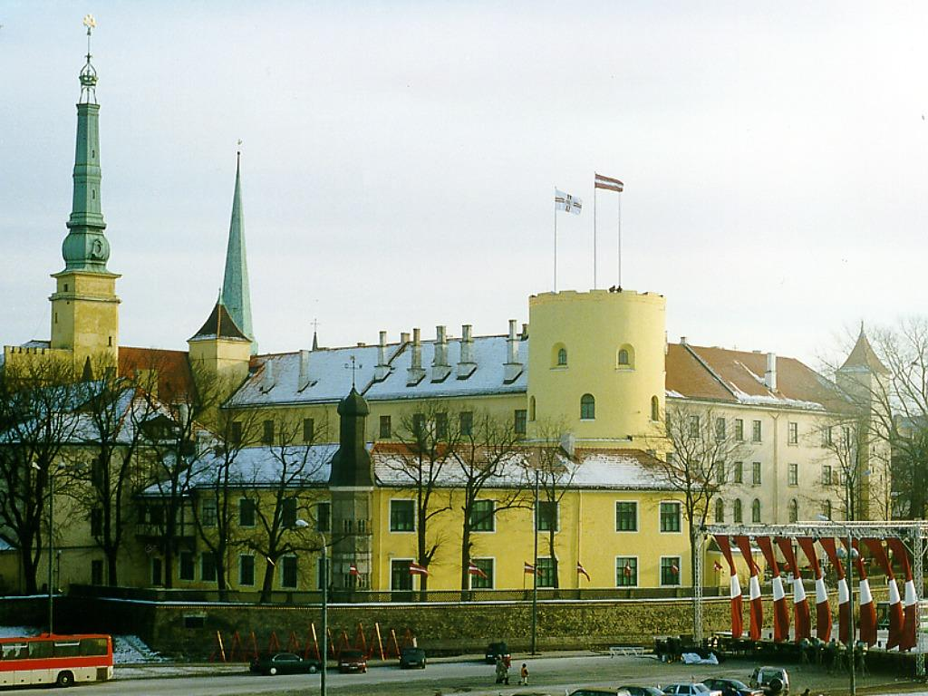 Rīgas pils 1998-11-18